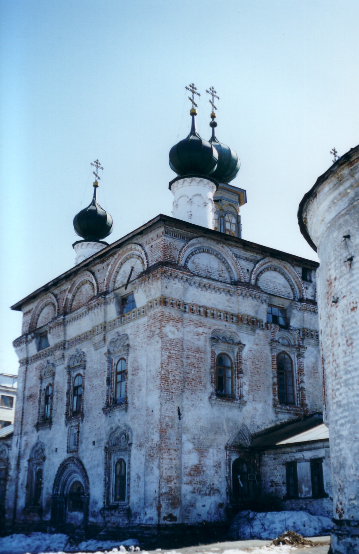 Спасская церковь. Город Соликамск